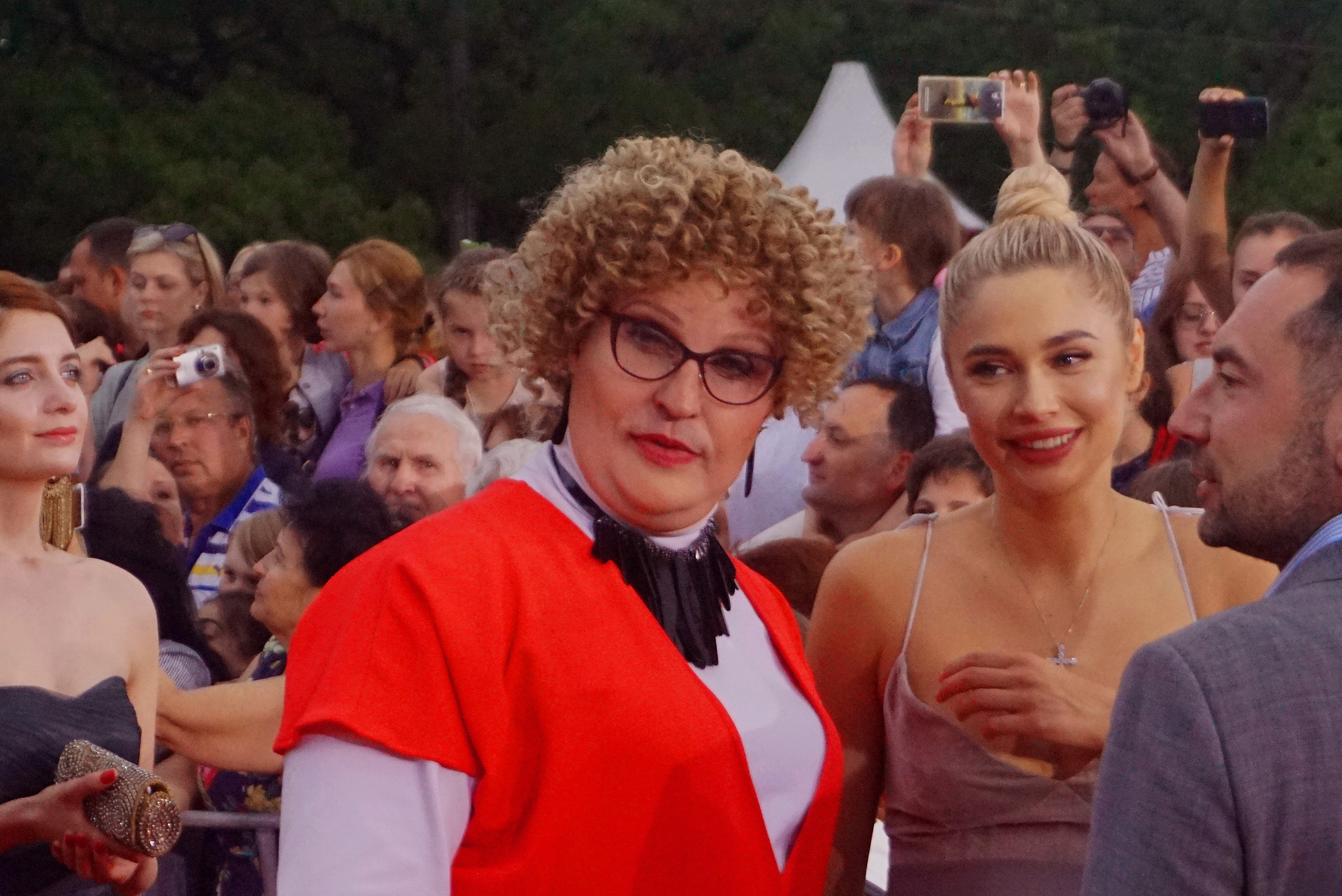 На звёздной дорожке Александр Рева в образе сумасшедшей бабушки. 28 кинофестиваль "Кинотавр". Сочи, 2017 год.